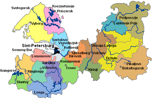 Kaart van de oblast Leningrad met de belangrijkste steden